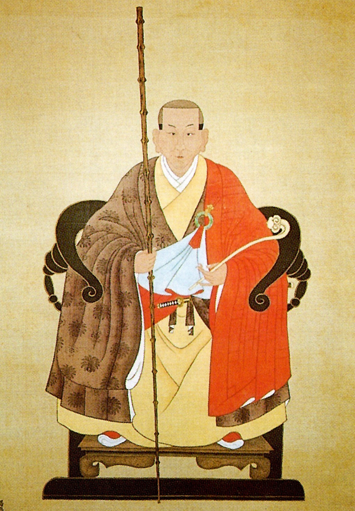 鍋島直英の肖像。